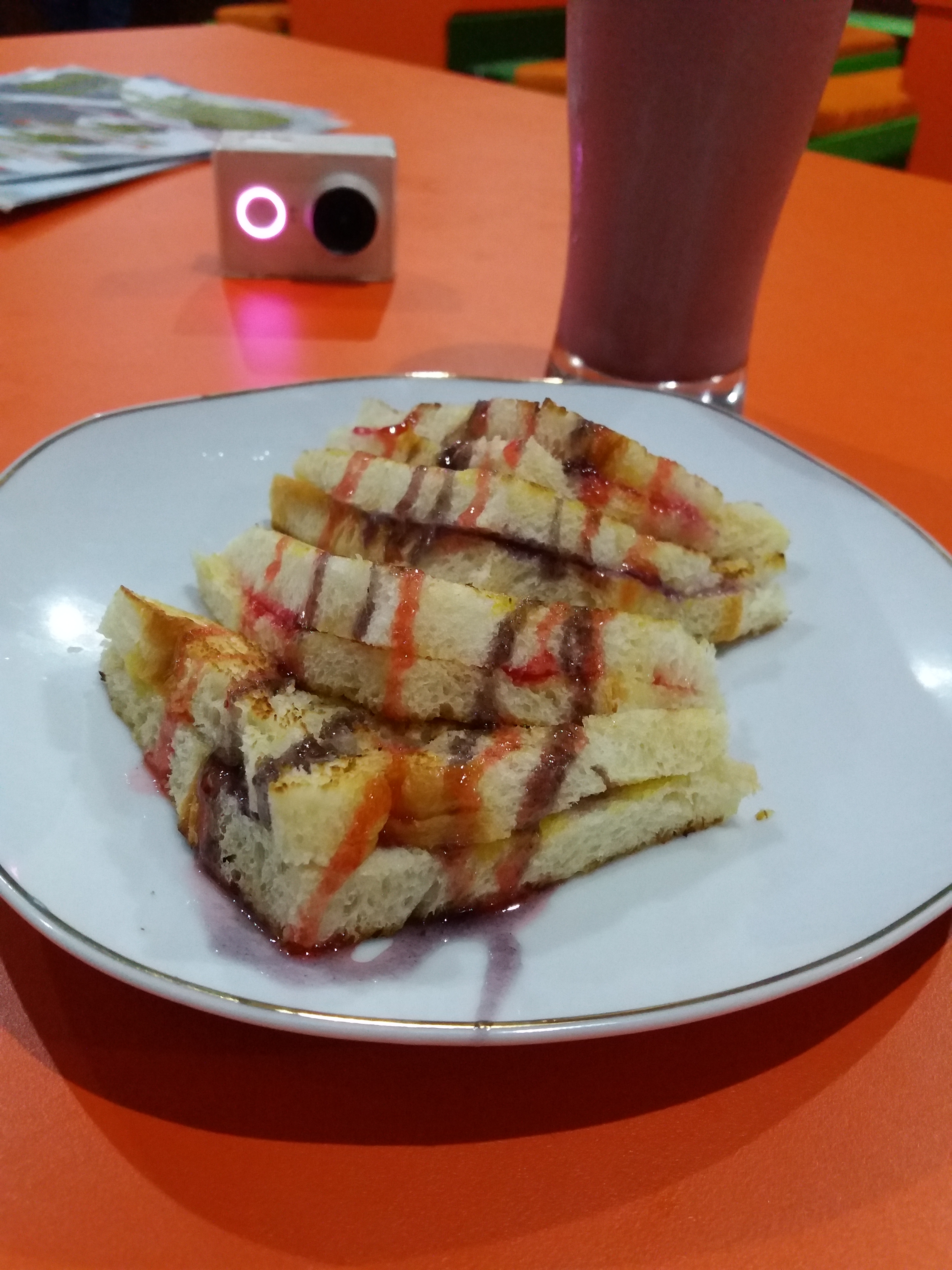 Basa Jawa: sapa wong sing ora doyan marang roti iki, rasa coklat campur strawberry agawe weteng malih luwé. ayo para kanca nyoba bareng